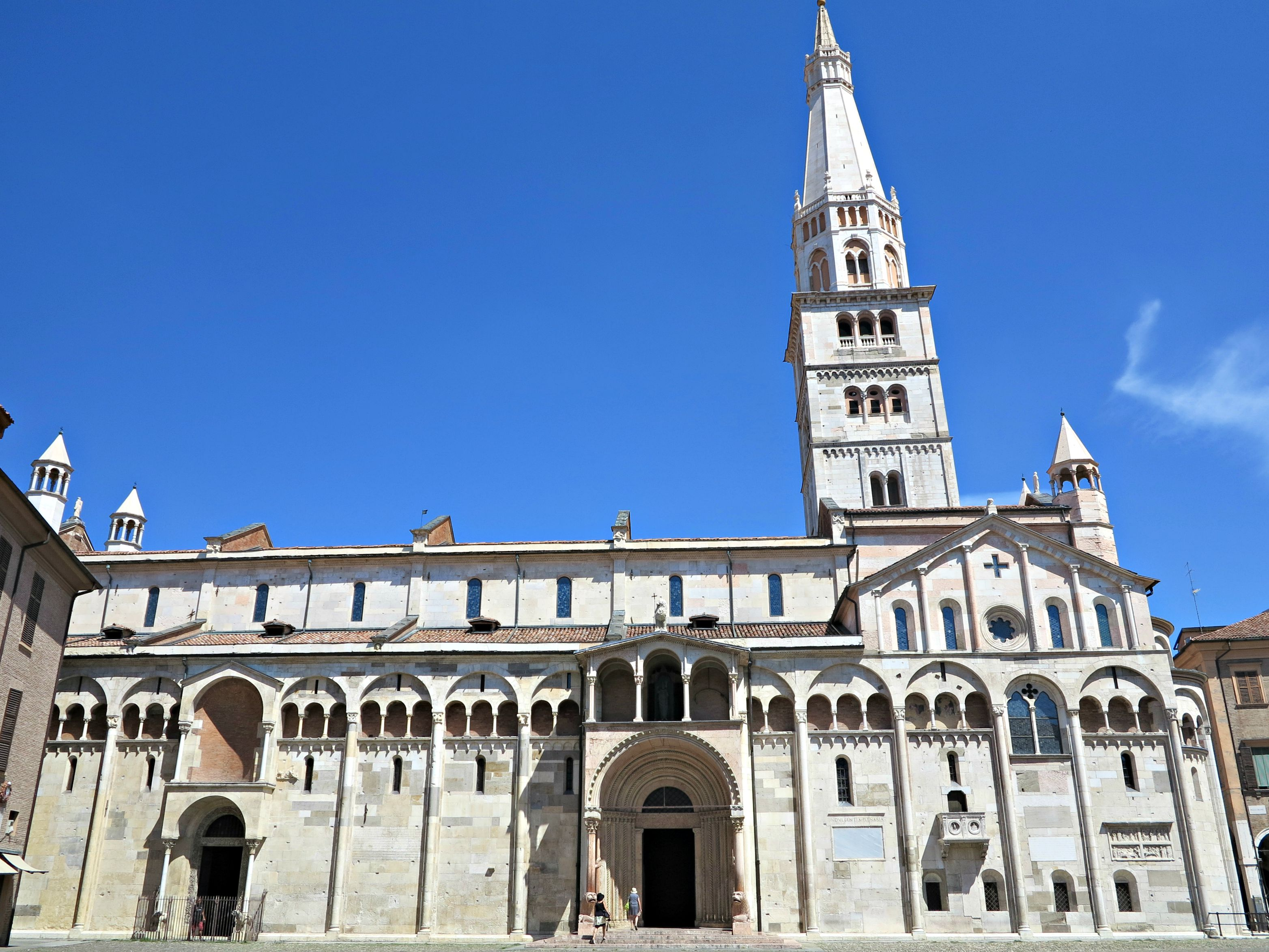 Duomo (solo esterni) This is a photo of a monument which is part of cultural heritage of Italy.